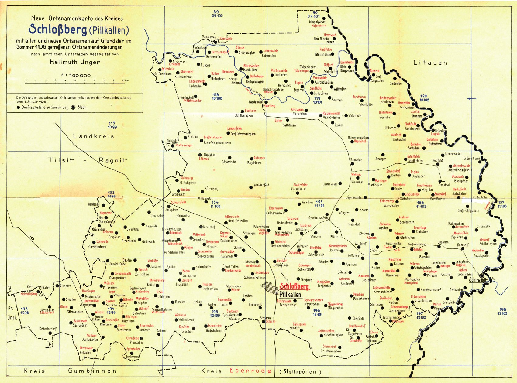 Karte des Kreises Schlossberg (Pillkallen) mit den alten und neuen Ortsnamen